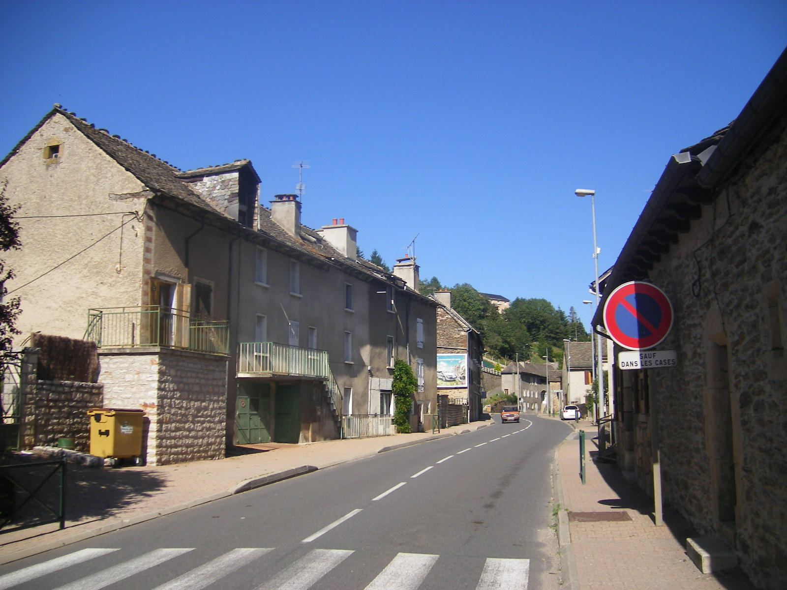 Badaroux, Lozère, France